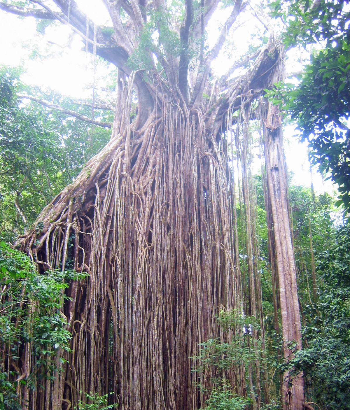 Curtain Fig Tree im Atherton Tableland, Queensland, Australien